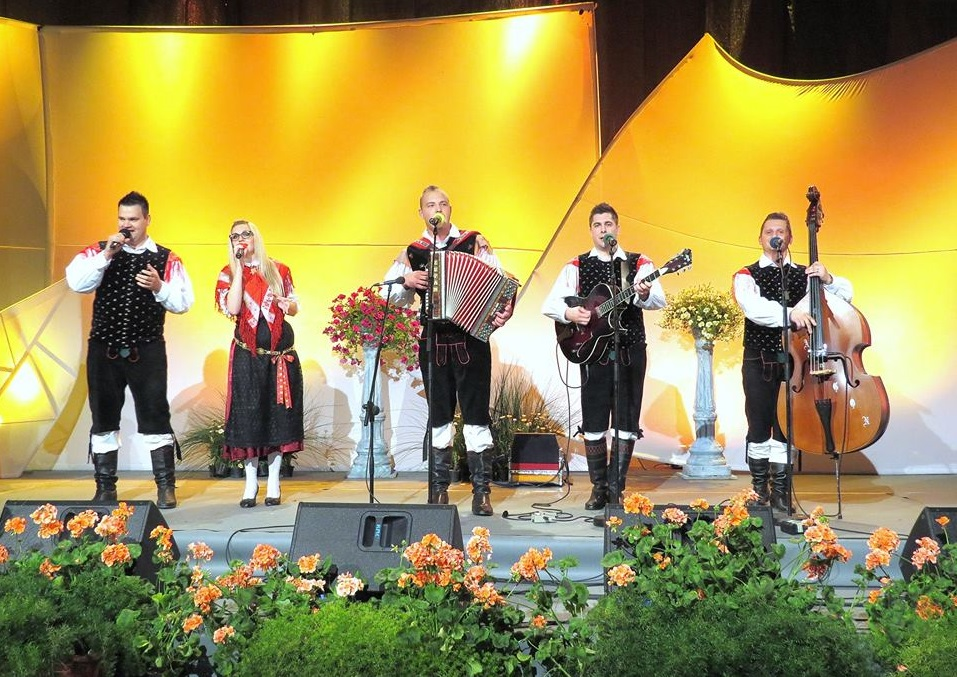 Ansambel Žargon med zmagovalnim nastopom na festivalu Vurberk 2015.